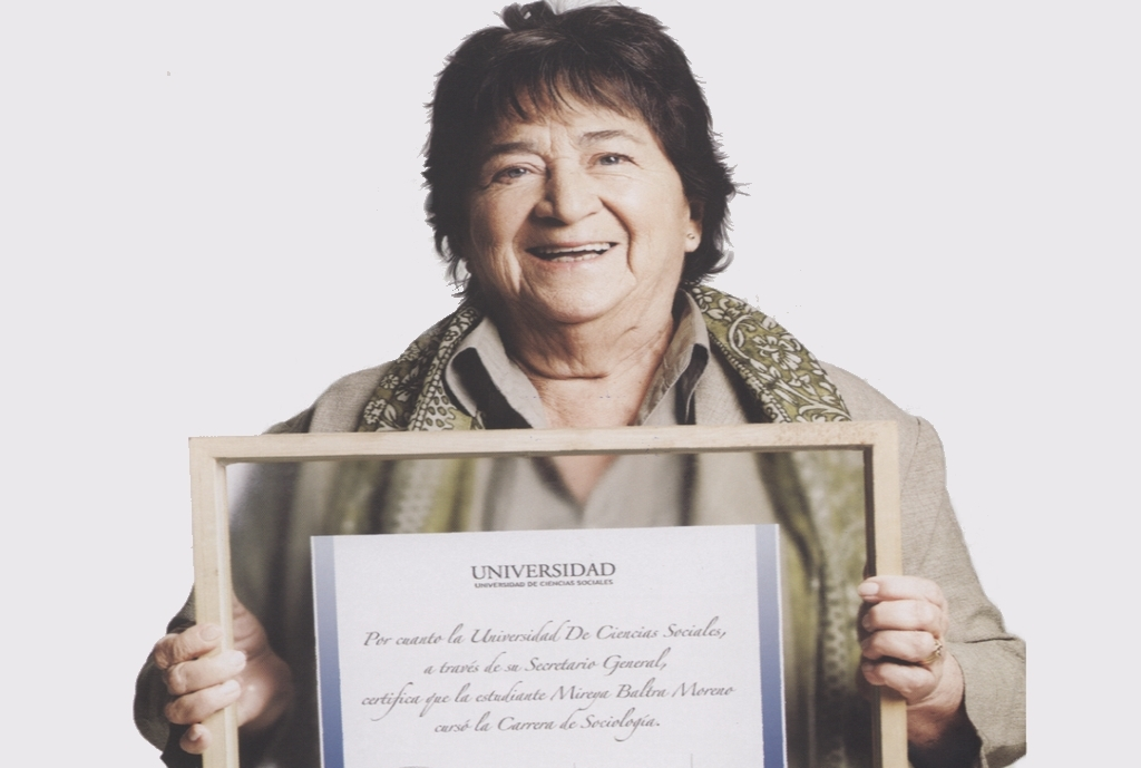 Mireya Baltra política chilena (n. Santiago de Chile, 25 de febrero de 1932).